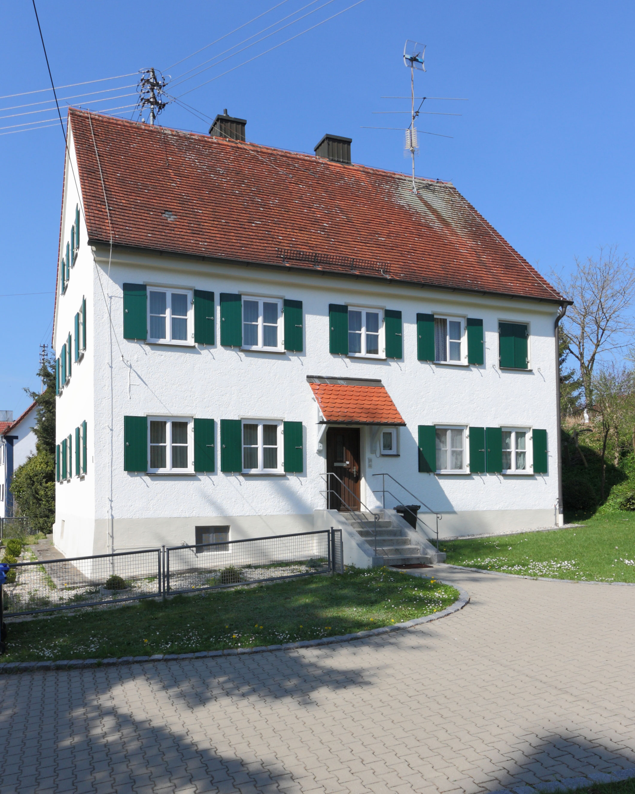 Pfarrhaus Memmenhausen; 1677 erbautes, später mehrfach renoviertes und erneuertes Gebäude. Ansicht von Süden